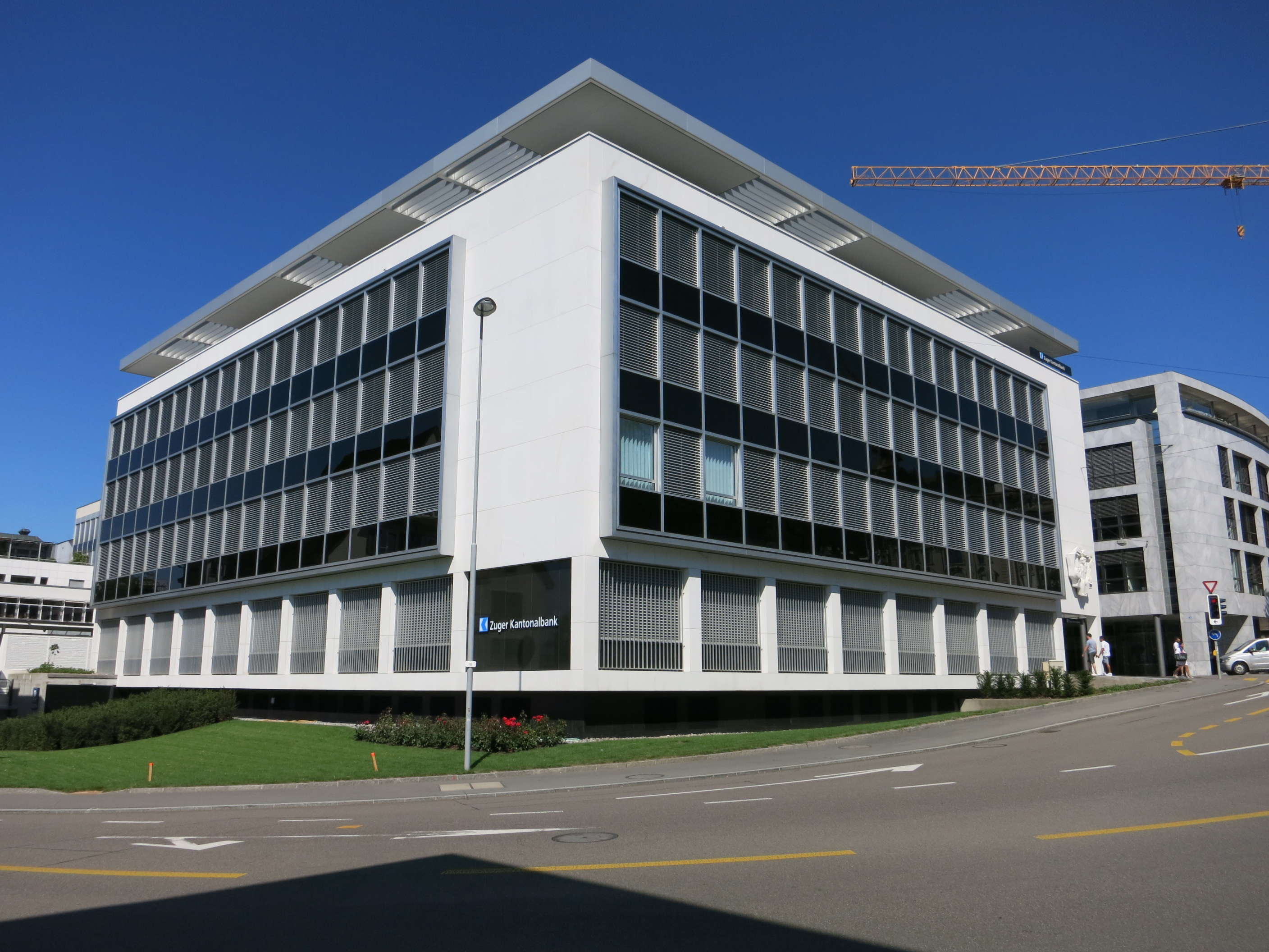 Zuger Kantonalbank, Zug ZG, Schweiz